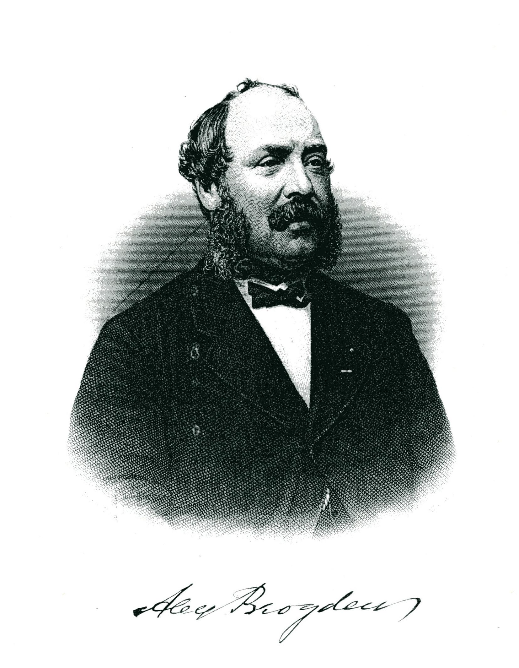 Alexander Brogden 19C Industrialist